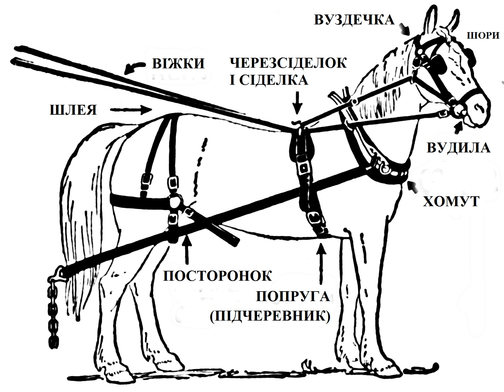 Схема елементів кінської упряжі (збруї)